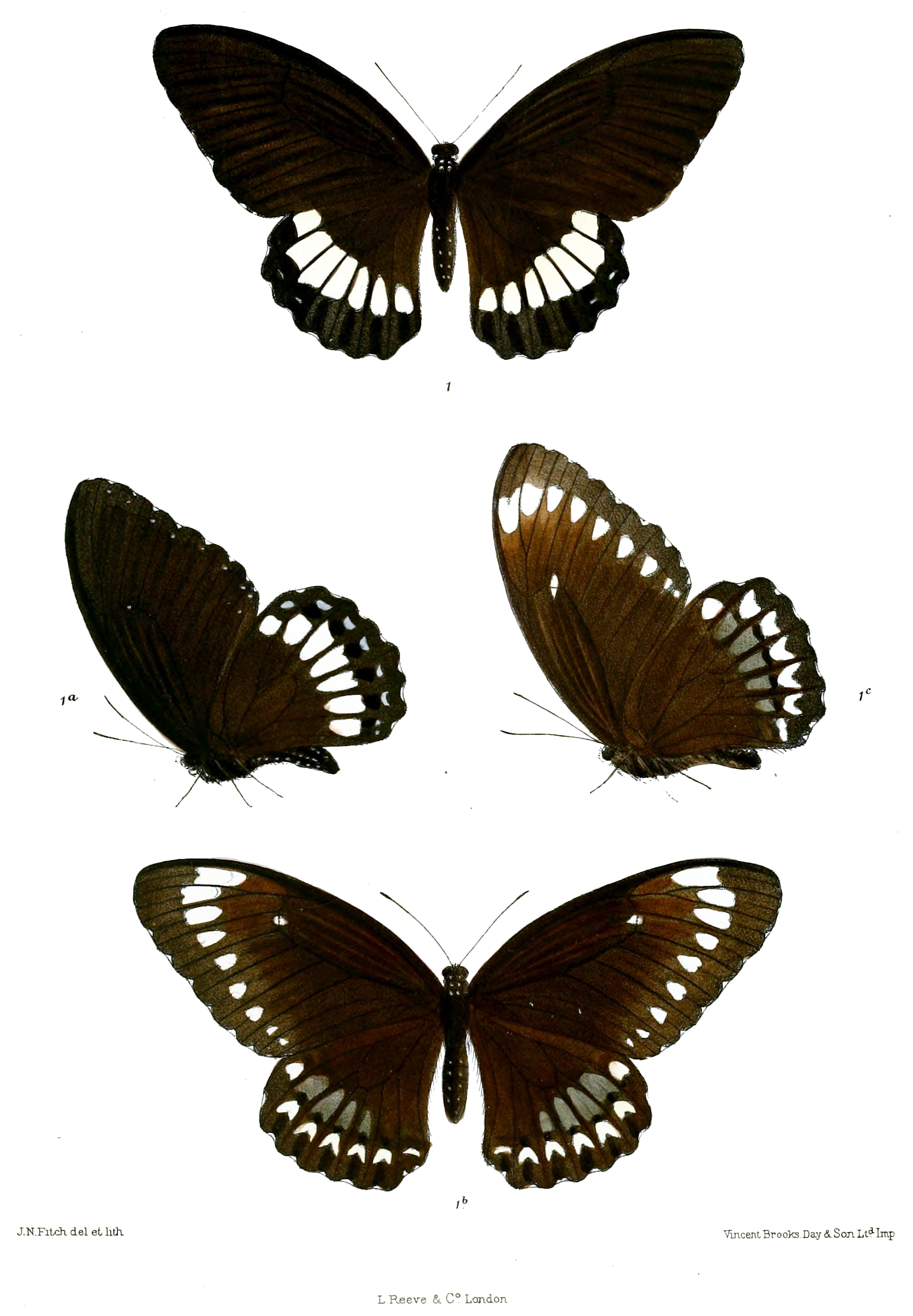 Tamera mehala = Papilio castor